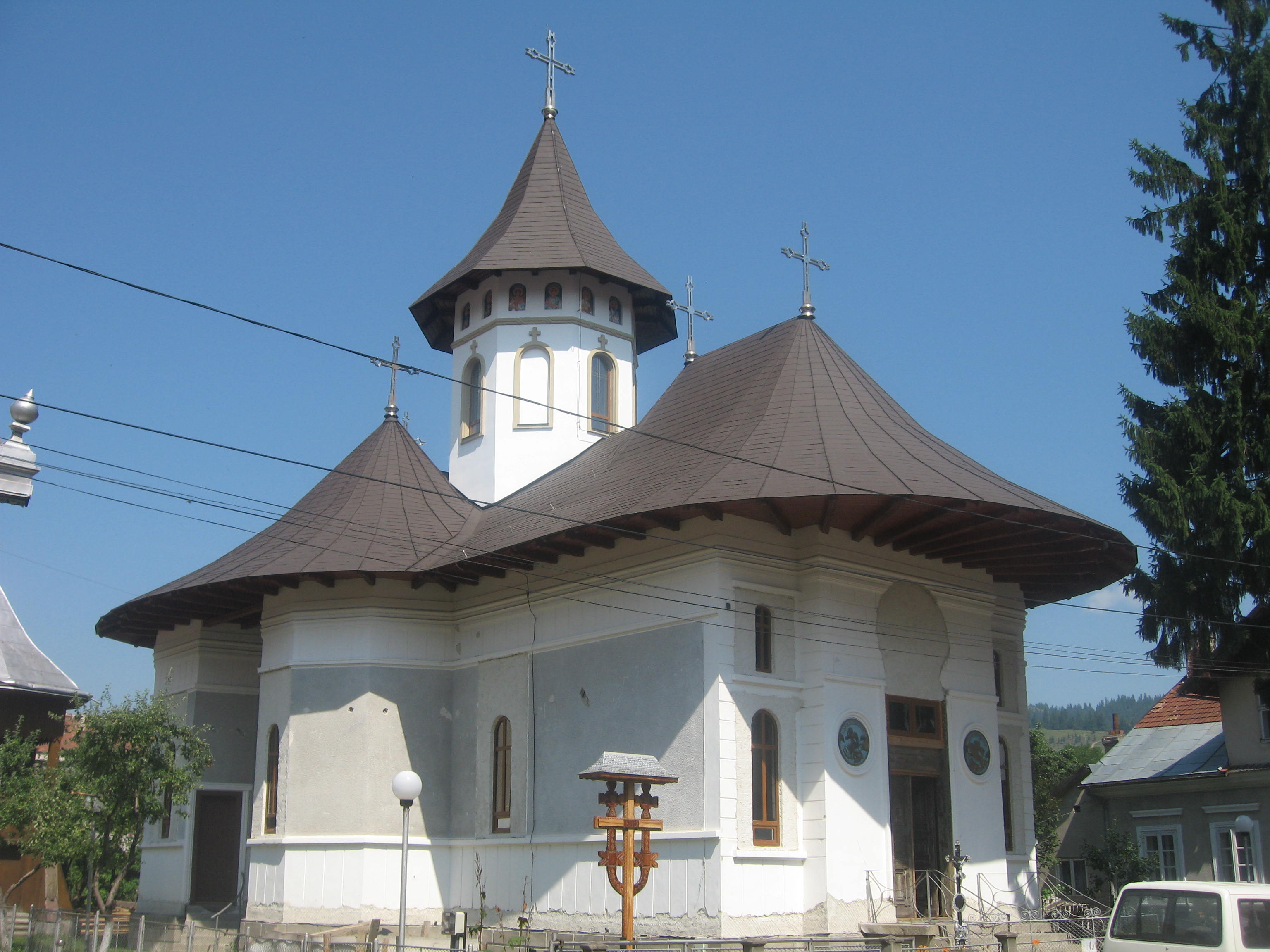 St. Demetrius Church in Câmpulung Moldovenesc, Romania